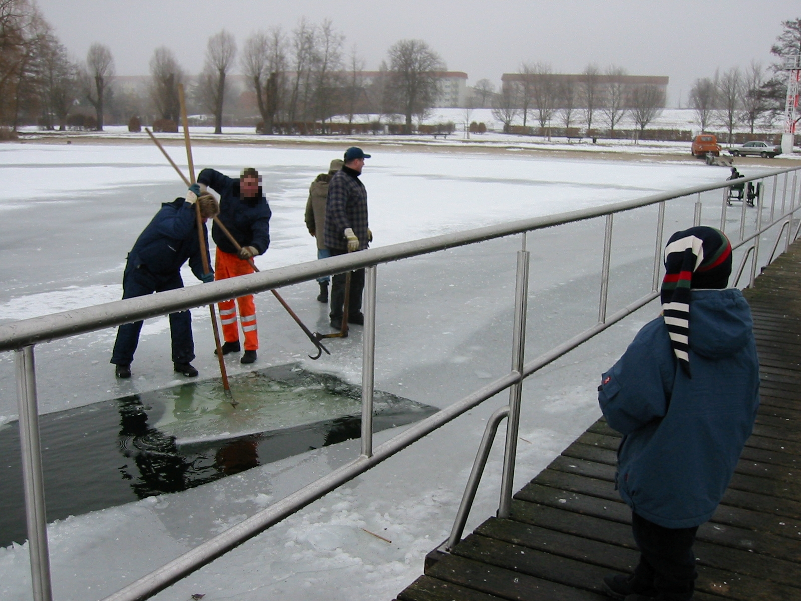 Arbeiter entfernen bei Frost im Februar 2003 am Volksbad am Müritzufer nahe der Röbeler Chaussee in Waren (Müritz) mit einer speziellen Eissäge (hinten) und Bootshaken Eisschollen, um den Steg vor Beschädigungen zu schützen.